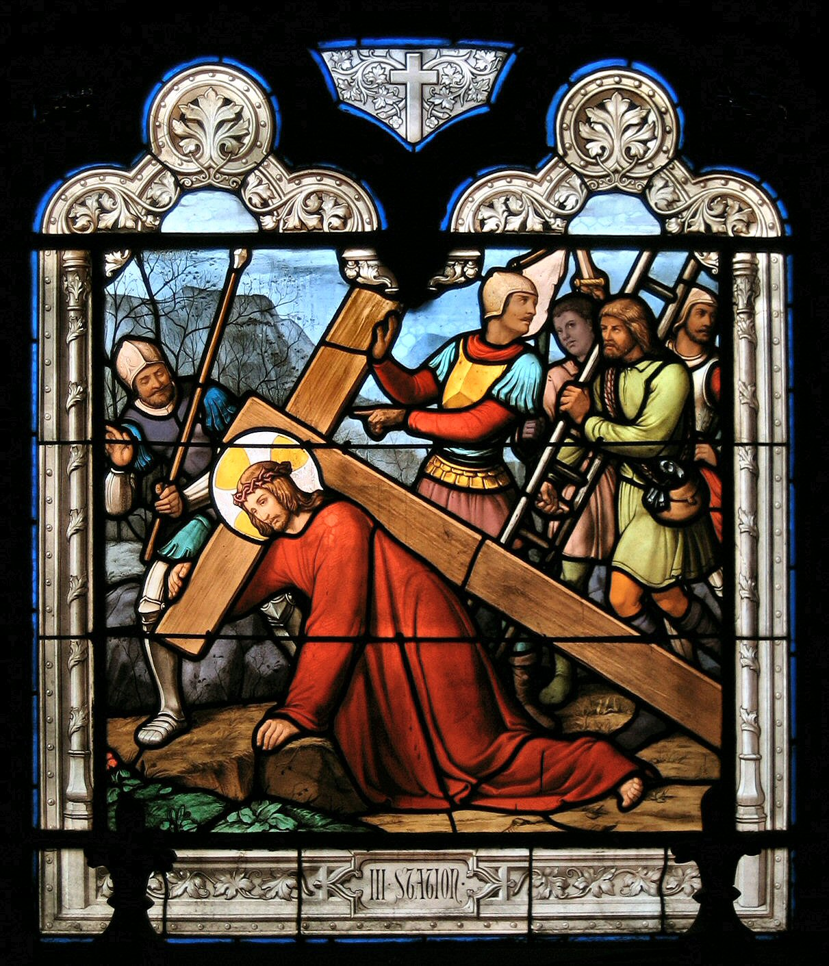 Église St-Eugène Ste-Cécile. Vitrail : station III du chemin de croix; nach einem Karton von Jean Alfred Gérard-Séguin, Herstellung: Eugène Oudinot